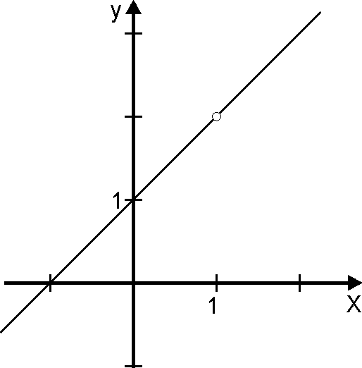 Funktion y = x 2 − 1 x − 1 {\displaystyle y={\frac {x^{2}-1}{x-1 }